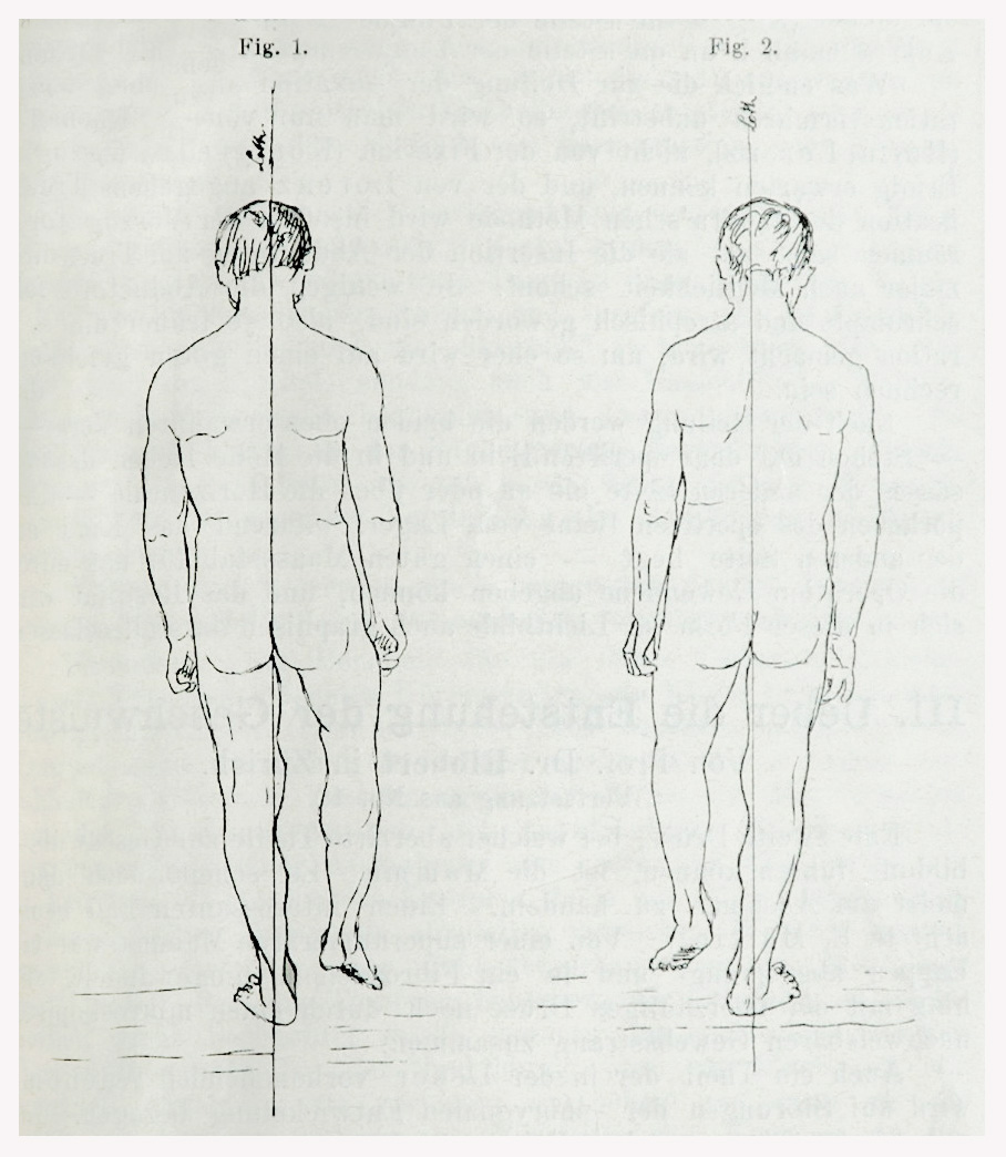 Abbildung aus der Erstbeschreibung des Trendelenburg-Zeichen Für das Lichtbild